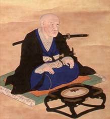 本多忠統の肖像。